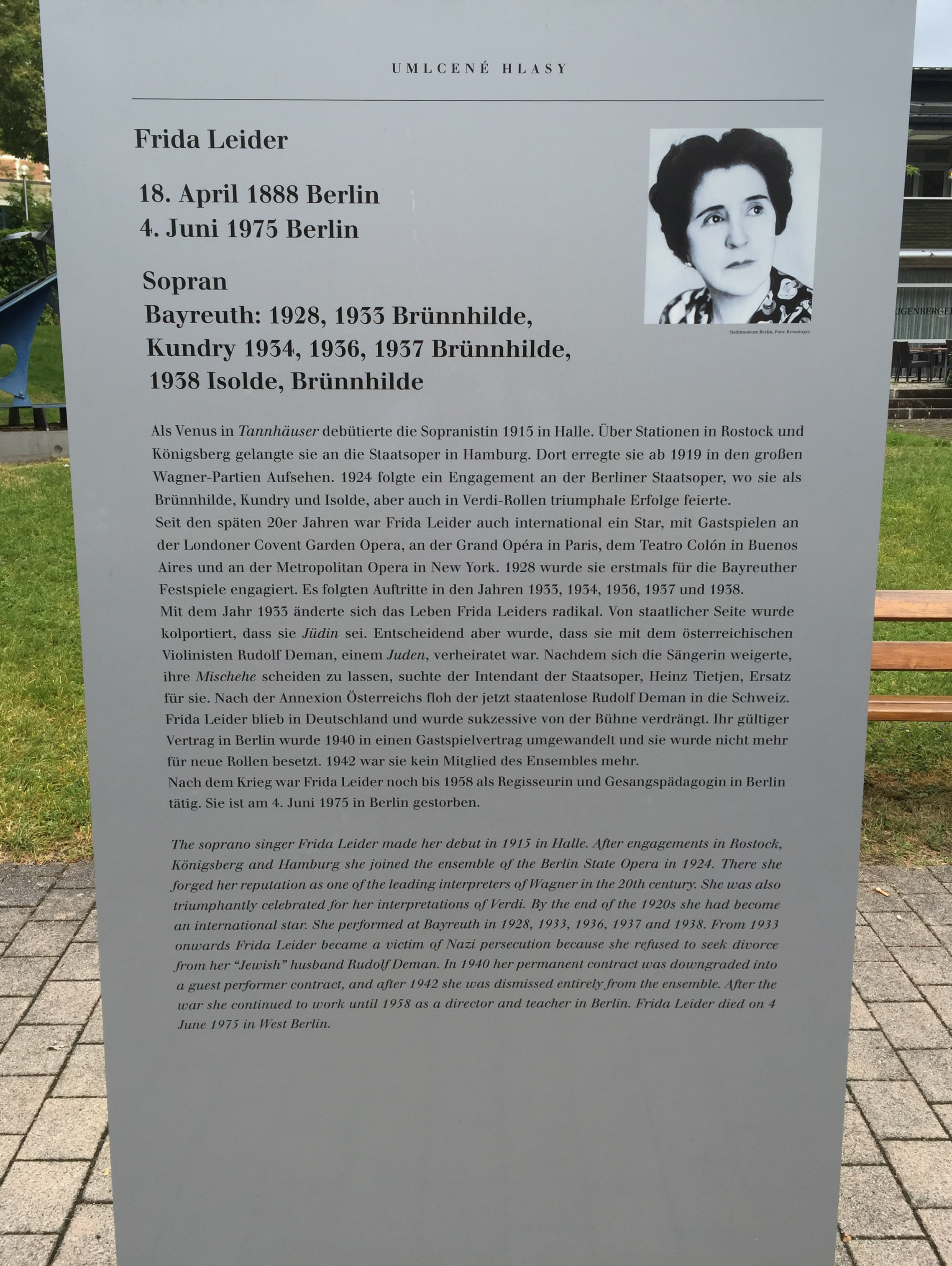 "Verstummte Stimmen - Die Bayreuther Festspiele und die 'Juden' 1876 bis 1945", Ausstellung 2016